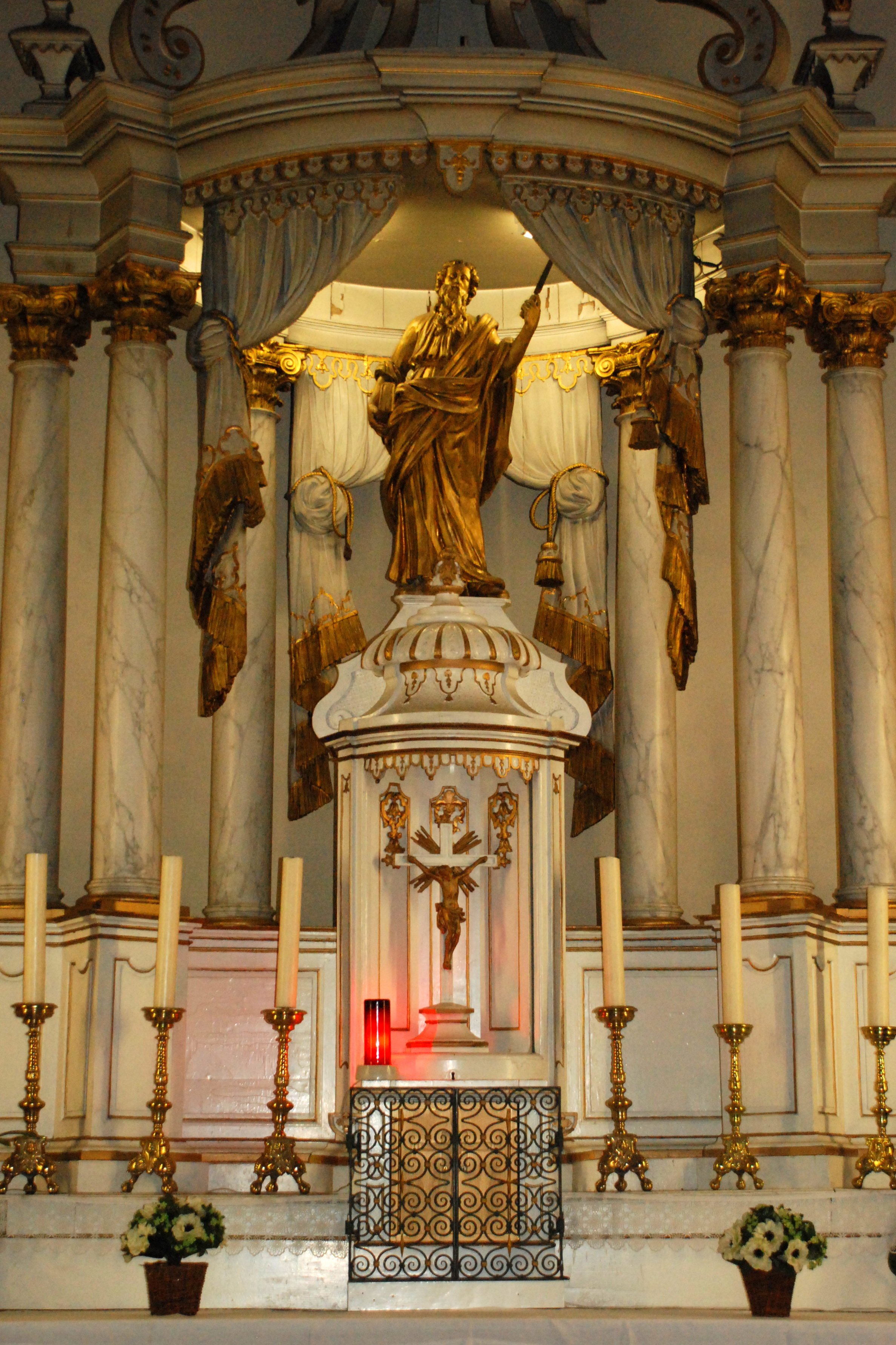 Belgique - Bousval - Église Saint-Barthélemy de Bousval